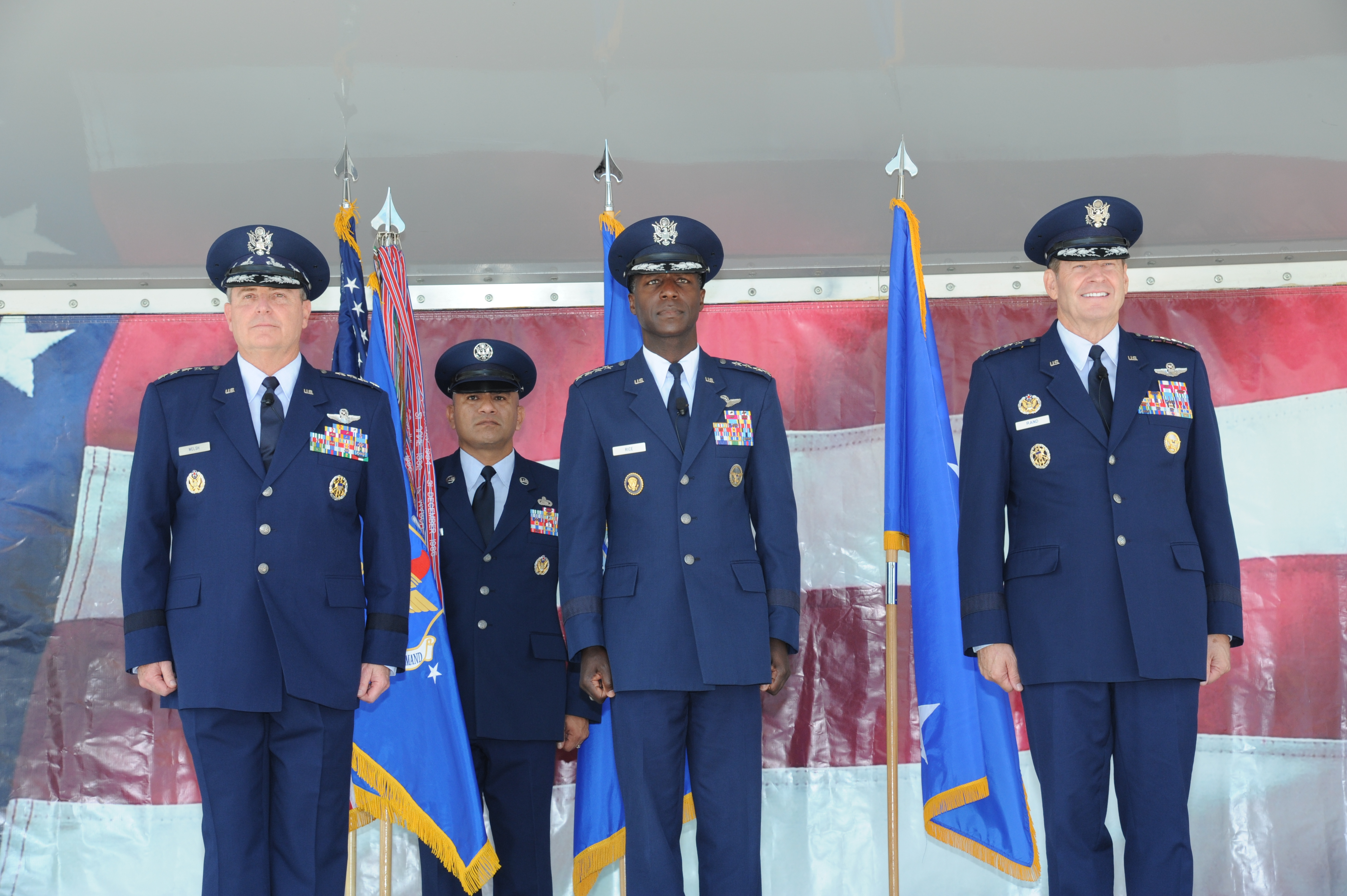 Change of Command Air Education and Training Command 2013 (Mark A. Welsh, Edward A. Rice, Jr., Robin Rand)